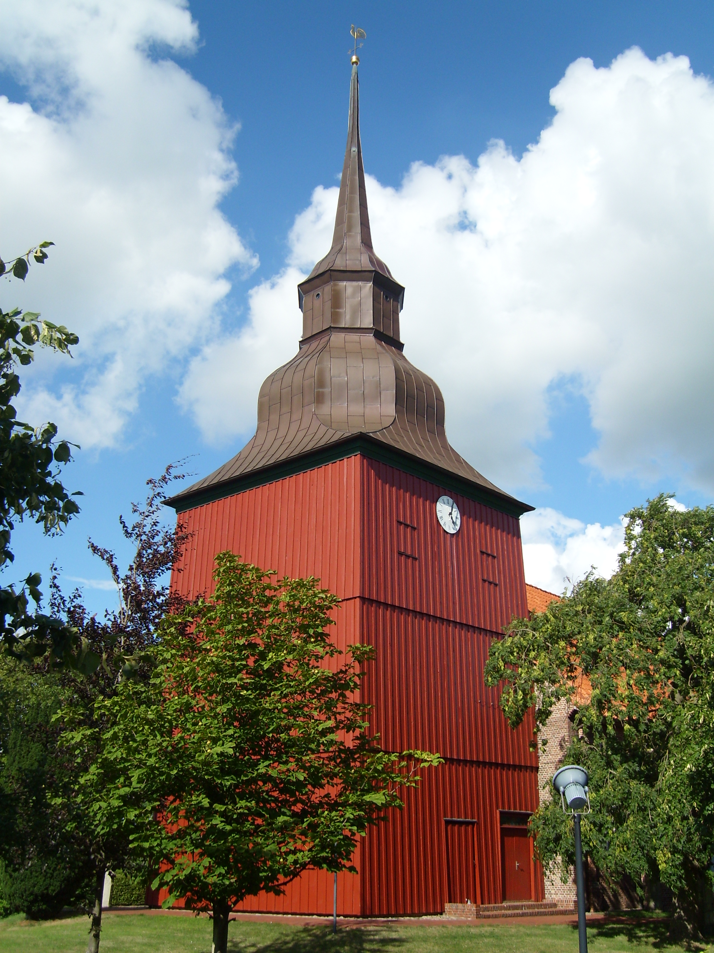 Der Turm der St. Nikolauskirche in Brokdorf